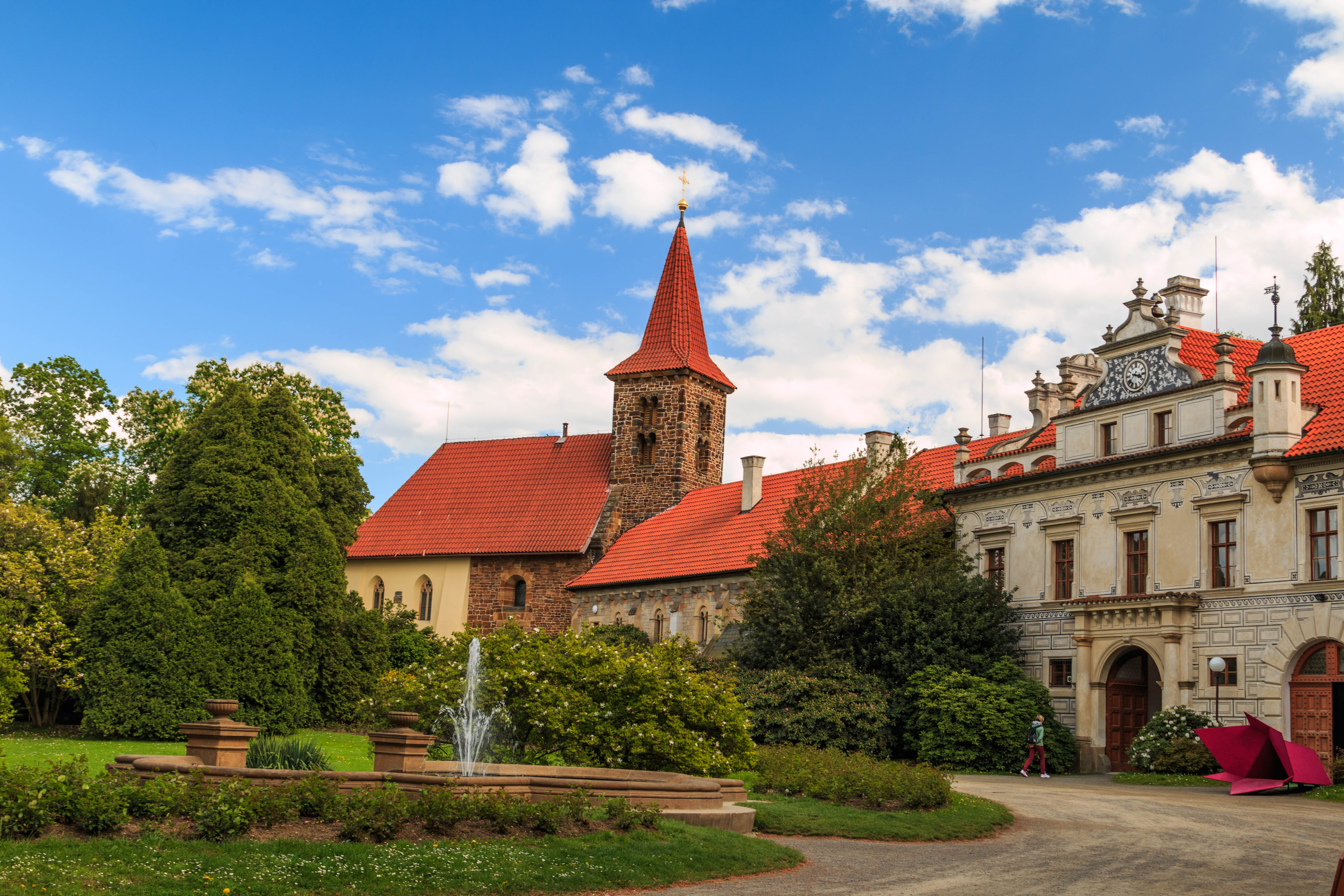 Zámek Průhonice, Průhonice, Osnice, Zdiměřice, Dobřejovice, Průhonice. Project: Chráněná území.